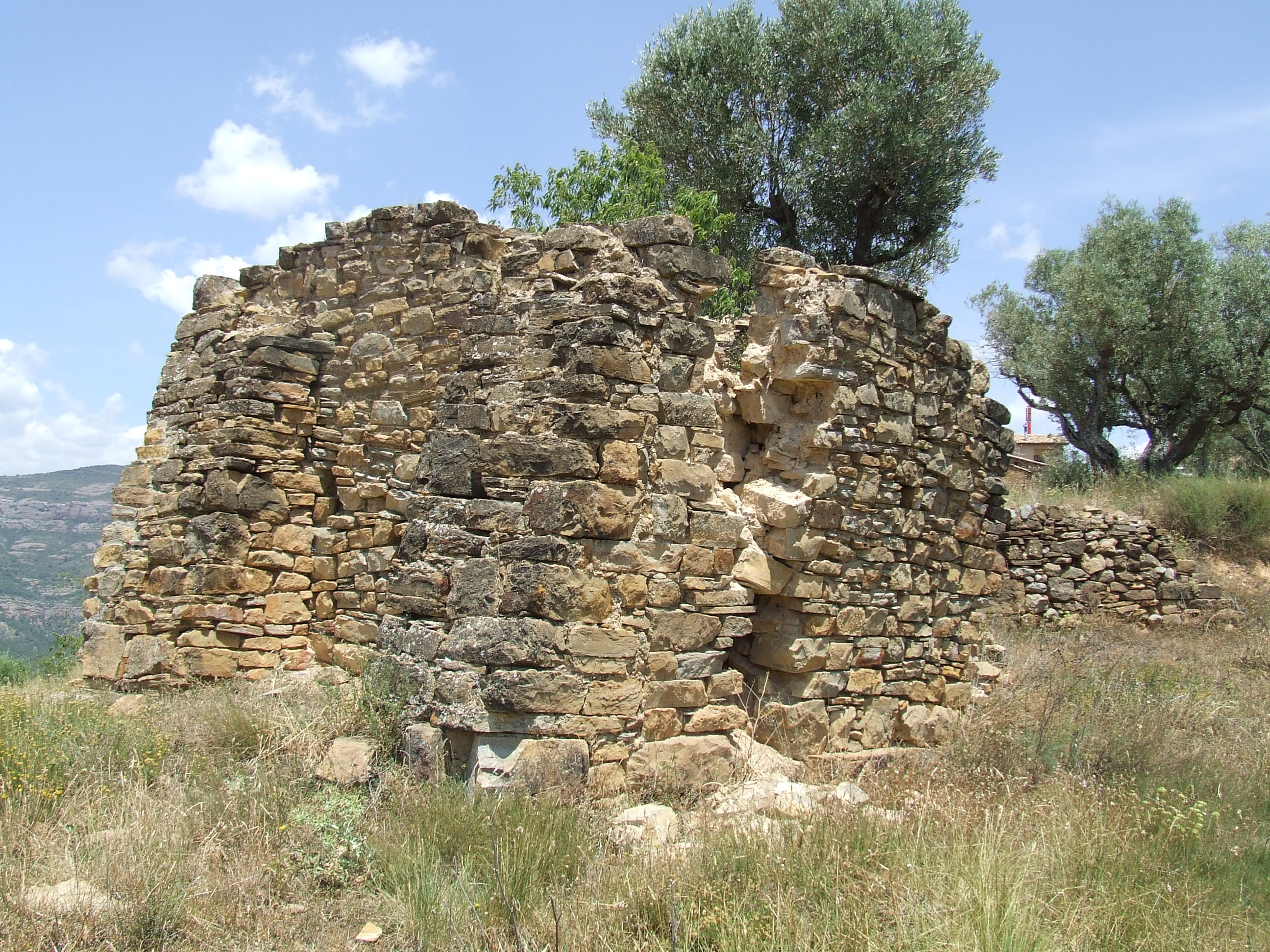 Santa Llúcia de Claverol (Conca de Dalt, Pallars Jussà)